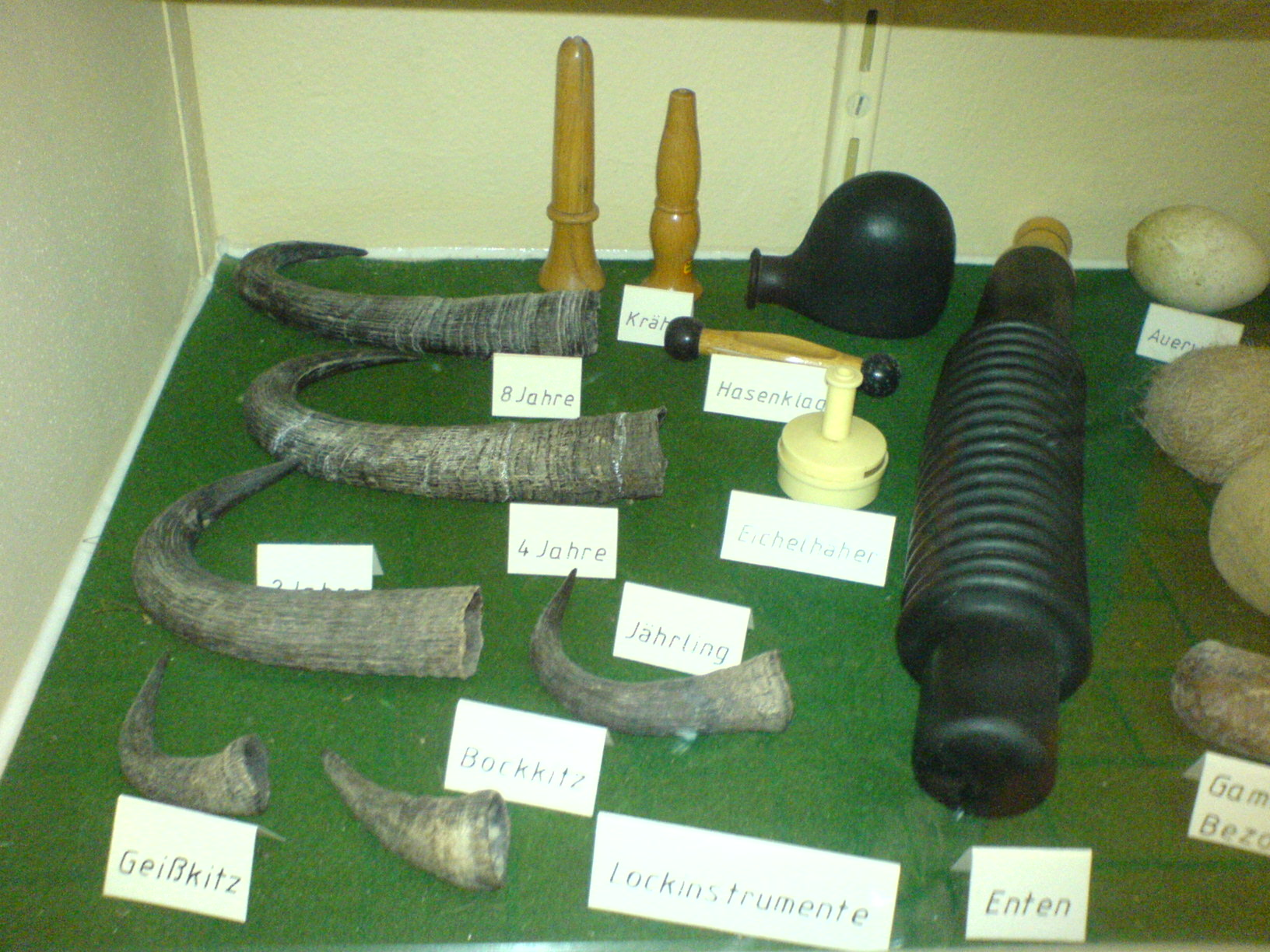 Lockinstrumente für die Jagd, Exponate im Tiermuseum Lenggries.